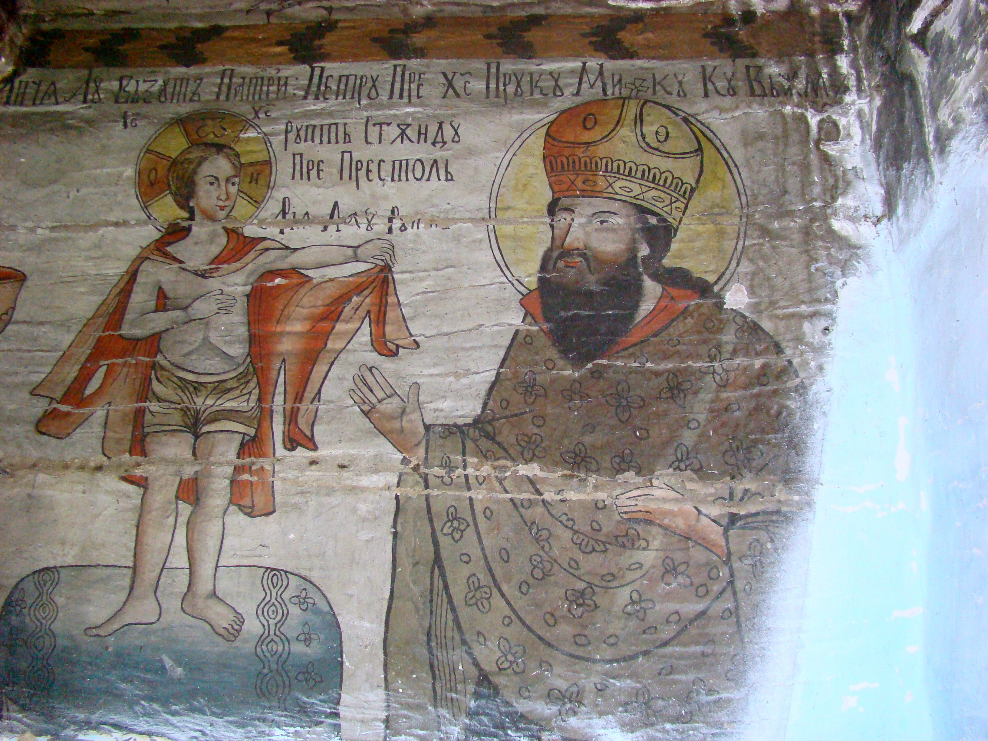 Biserica de lemn “Învierea Domnului” din Cubleșu, județul Sălaj